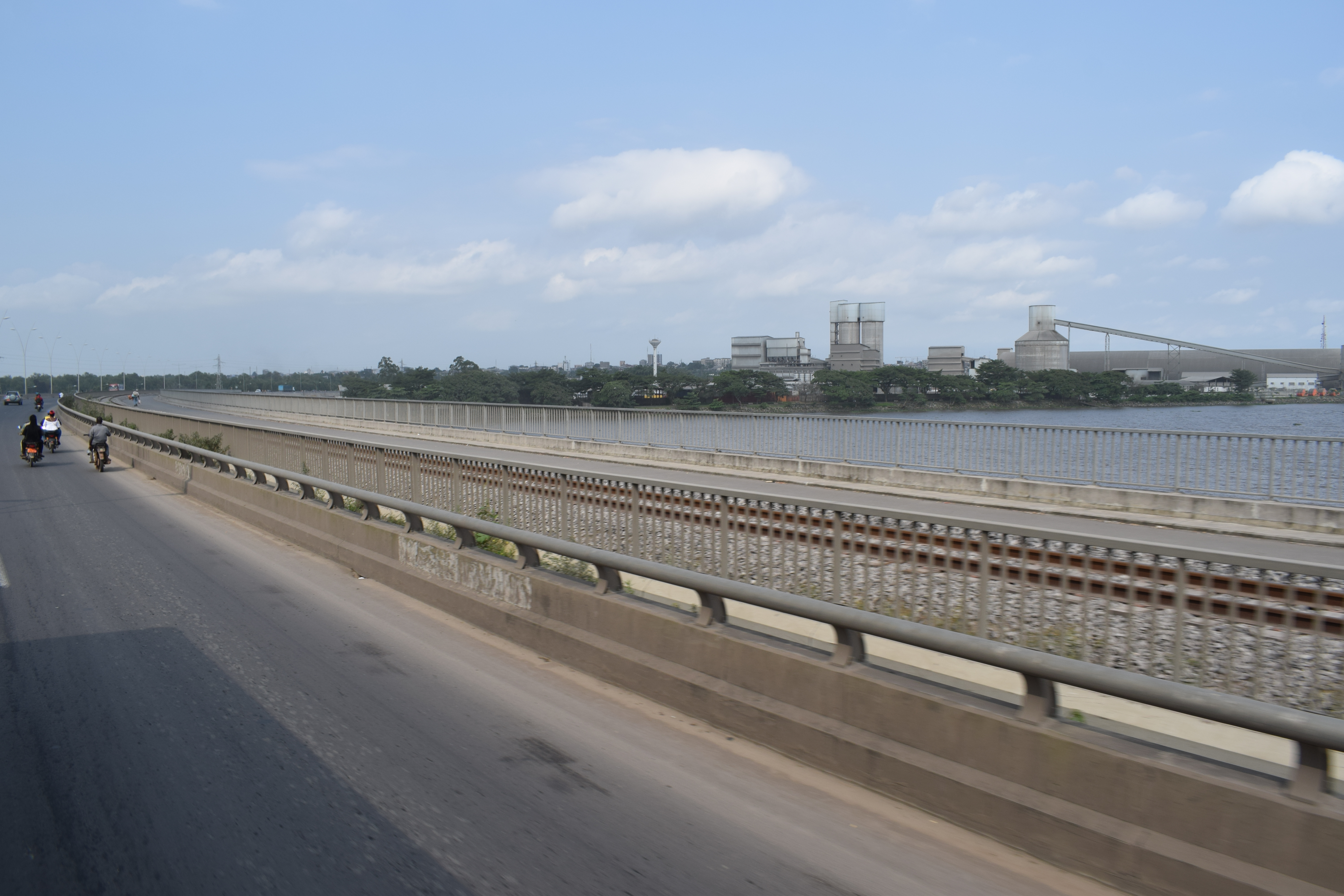 Fleuve Wouri à partir du nouveau pont sur le Wouri